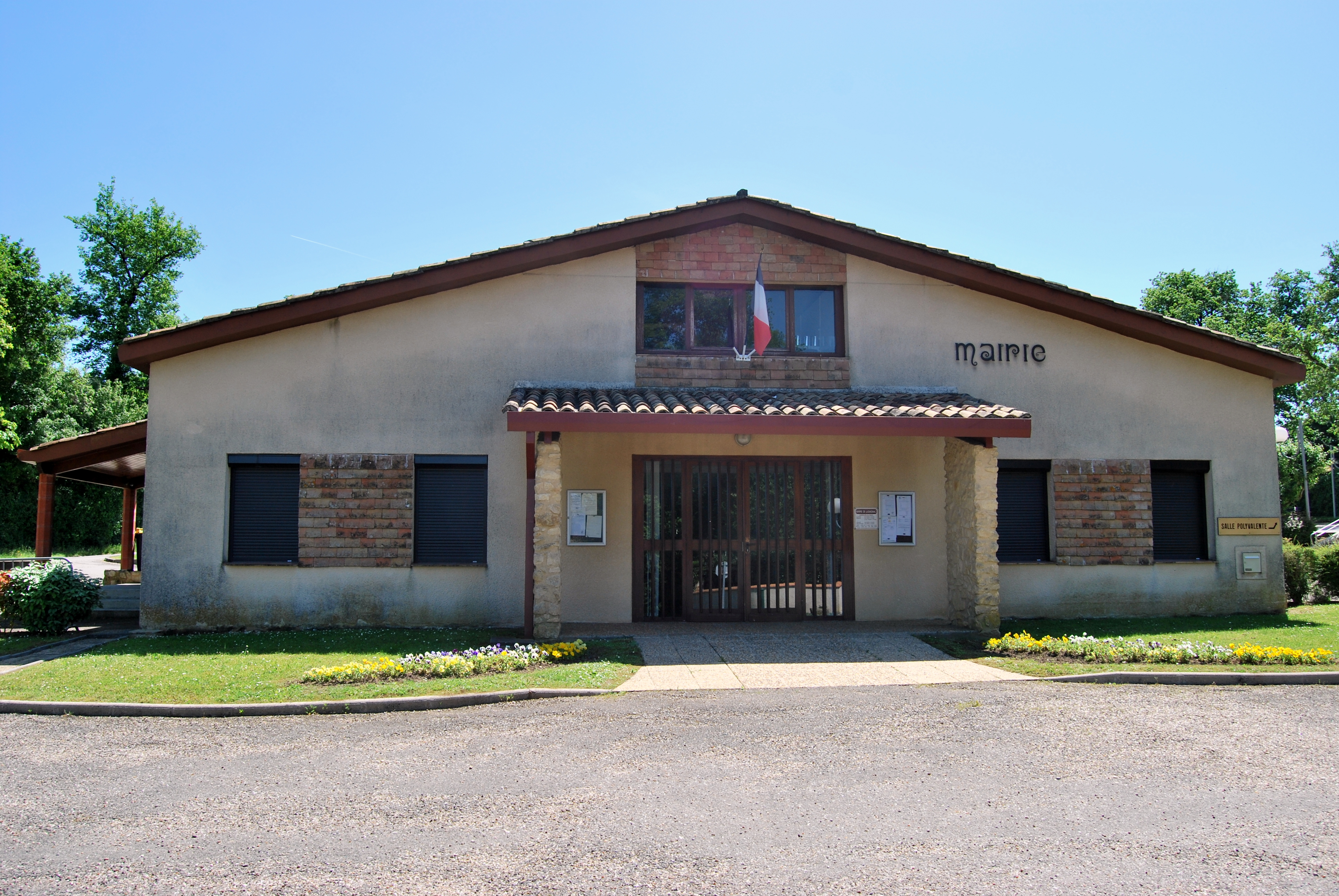 Lugaignac